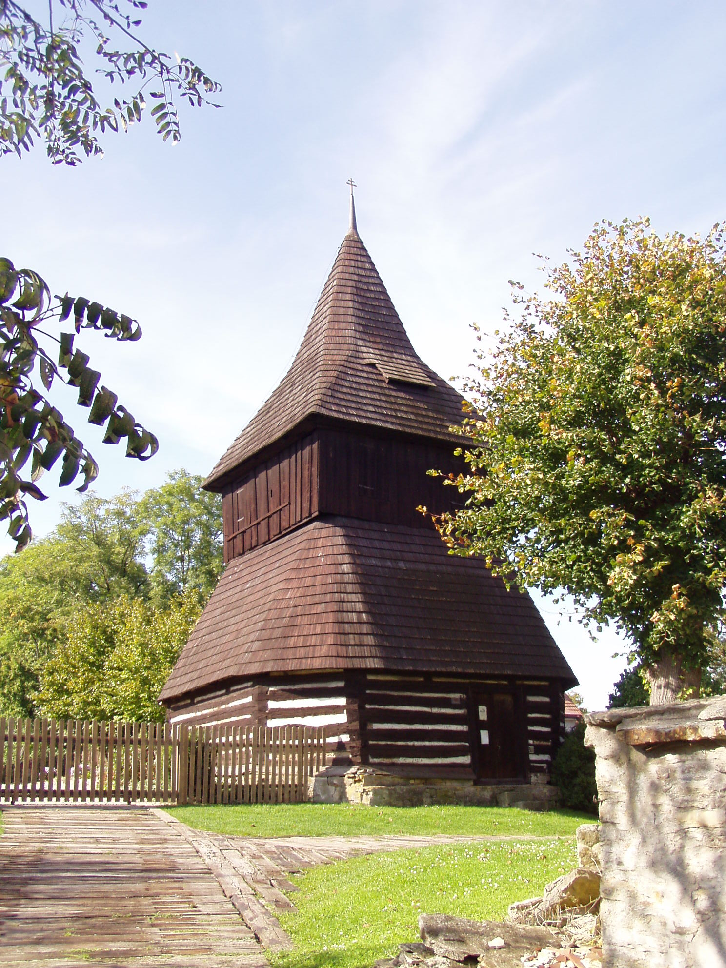 Zvonice v Rohenicích